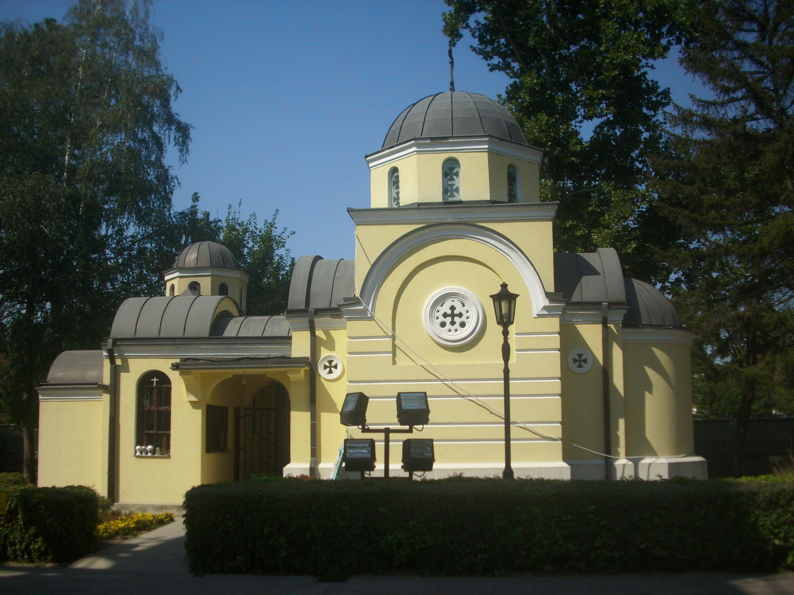 Стара црква и зграда скупштине у Крагујевцу